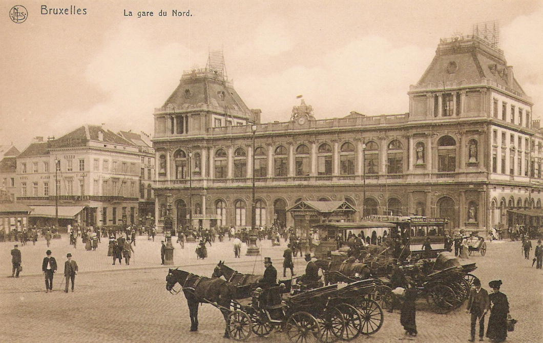 Carte postale (vers 1910). Collection privée. Numérisé par Huster